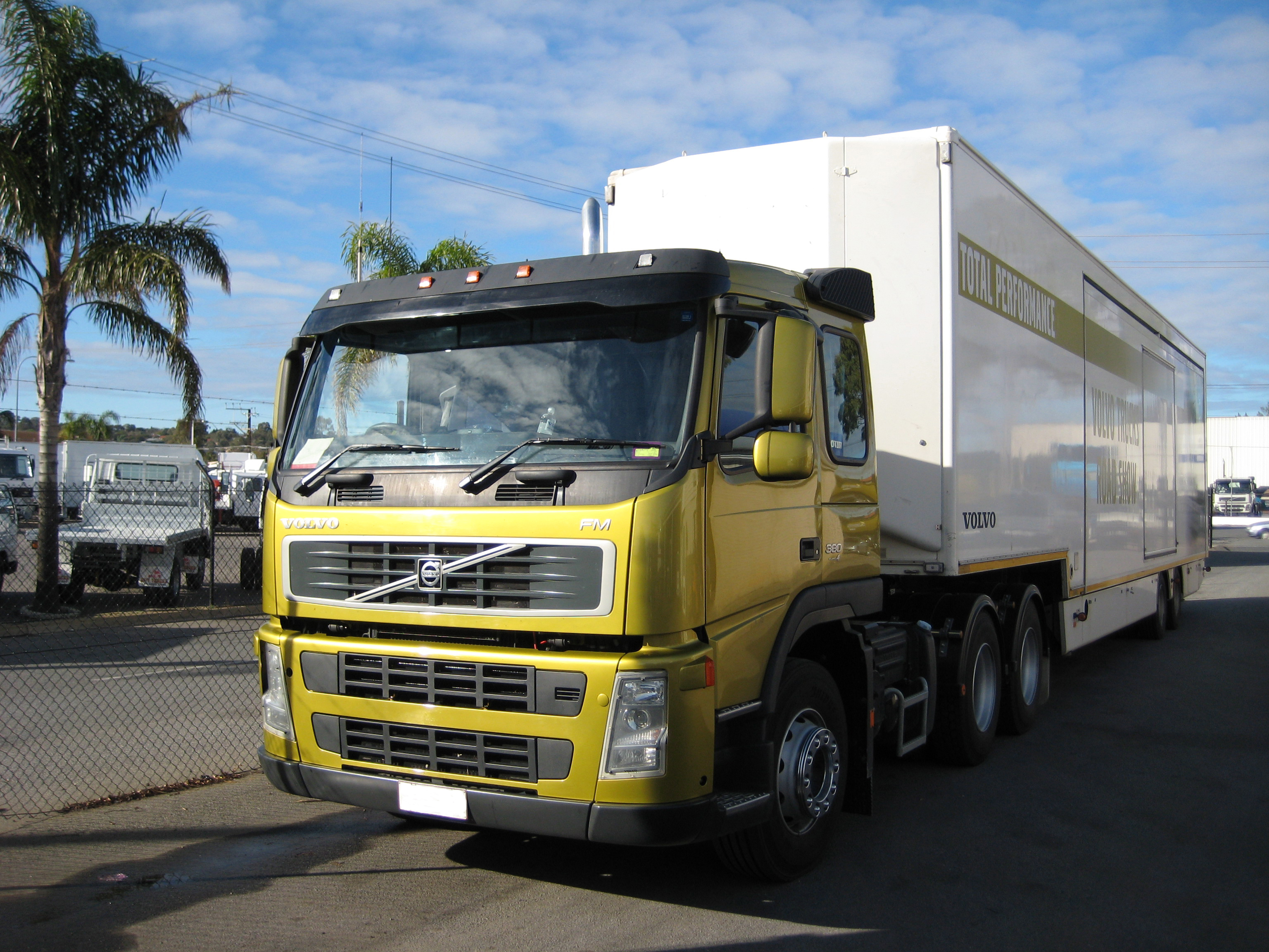 Volvo FM 6x4